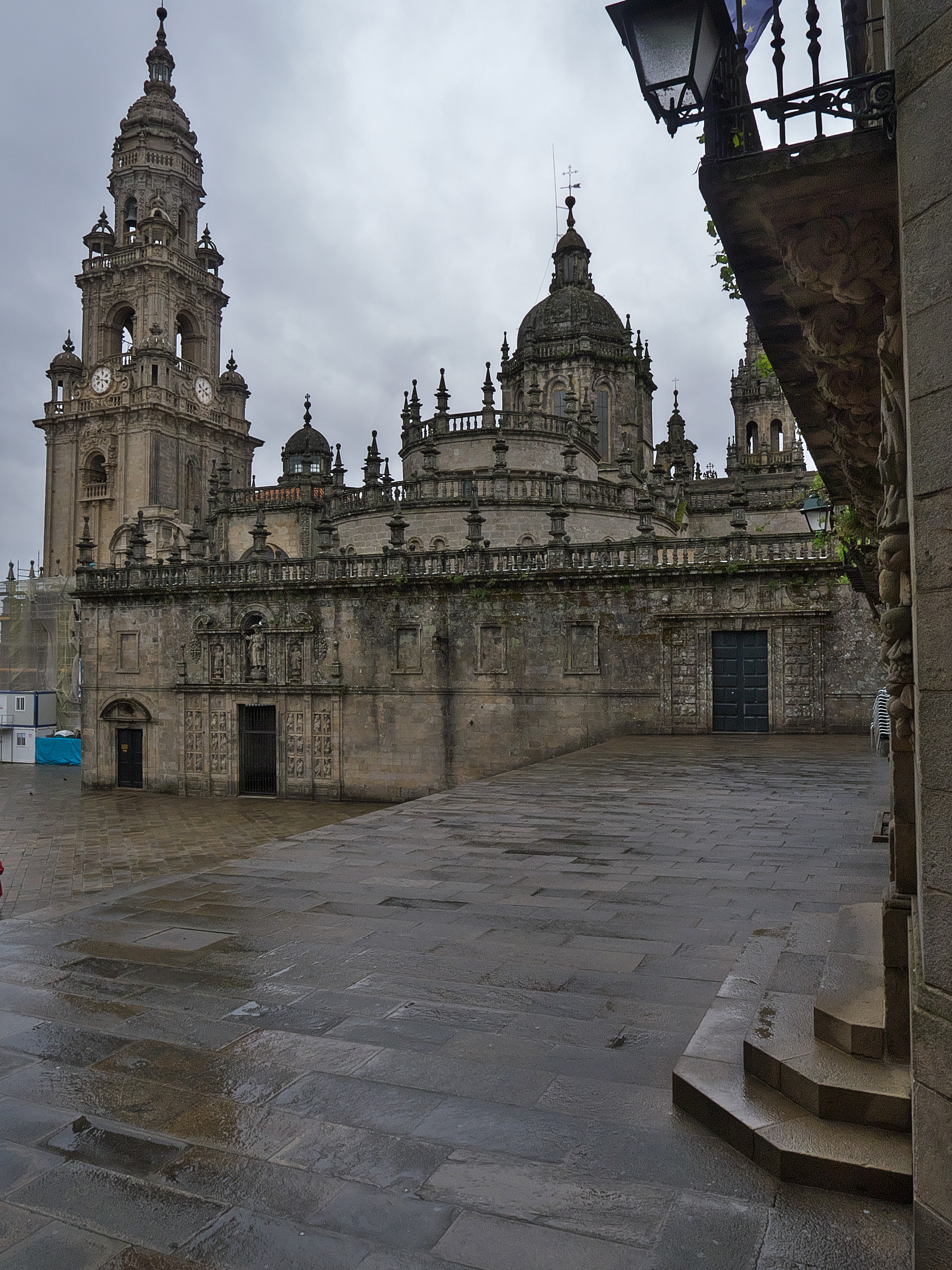 El rey Luis XI de Francia, regala las campanas del futuro campanario (1483). Se construye entre 1484 y 1494, siendo configurada por Domingo de Andrade (1676-1680), su primer trabajo en piedra, con el que alcanzaría la maestría del barroco gallego.